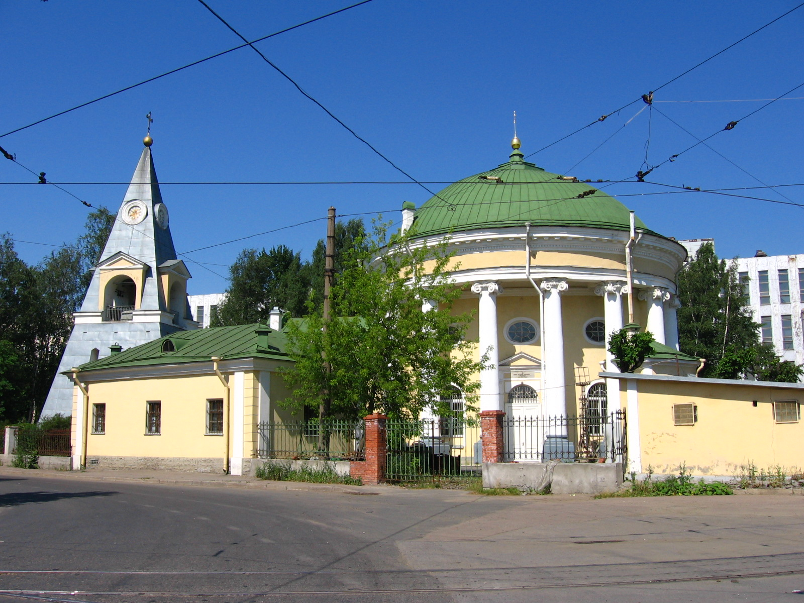 Храм " Кулич и Пасха", м."Пролетарская".